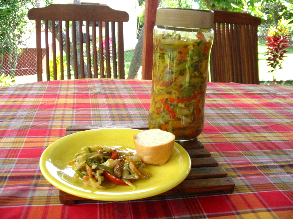 Achards de légumes. Photo personnelle, également publiée dans un blog sur la cuisine antillaise Utilisateur : mj971